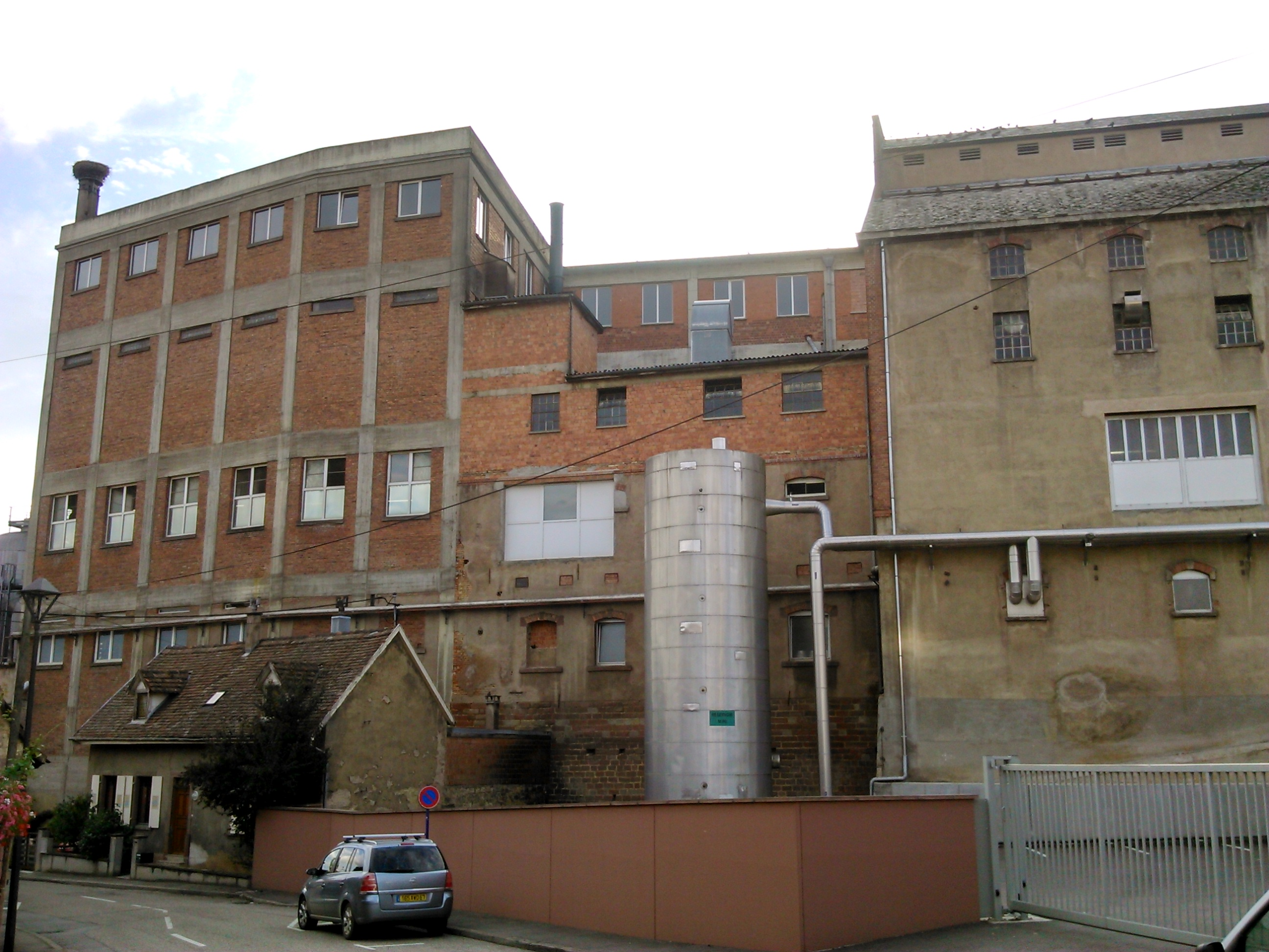 Brasserie Meteor à Hochfelden.